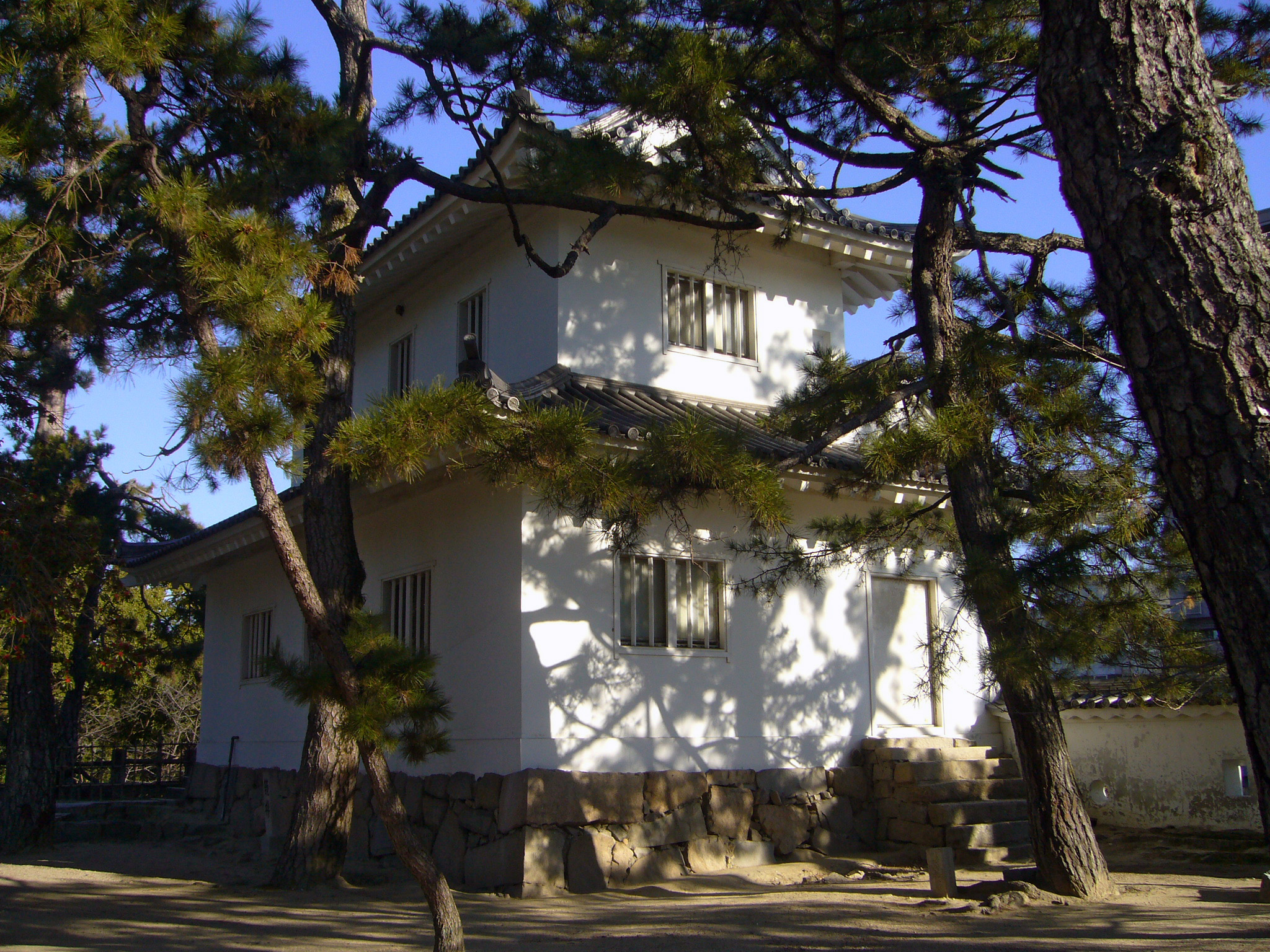 Fukuyama Castle "Kagami-yagura" in Fukuyama, Hiroshima prefecture, Japan